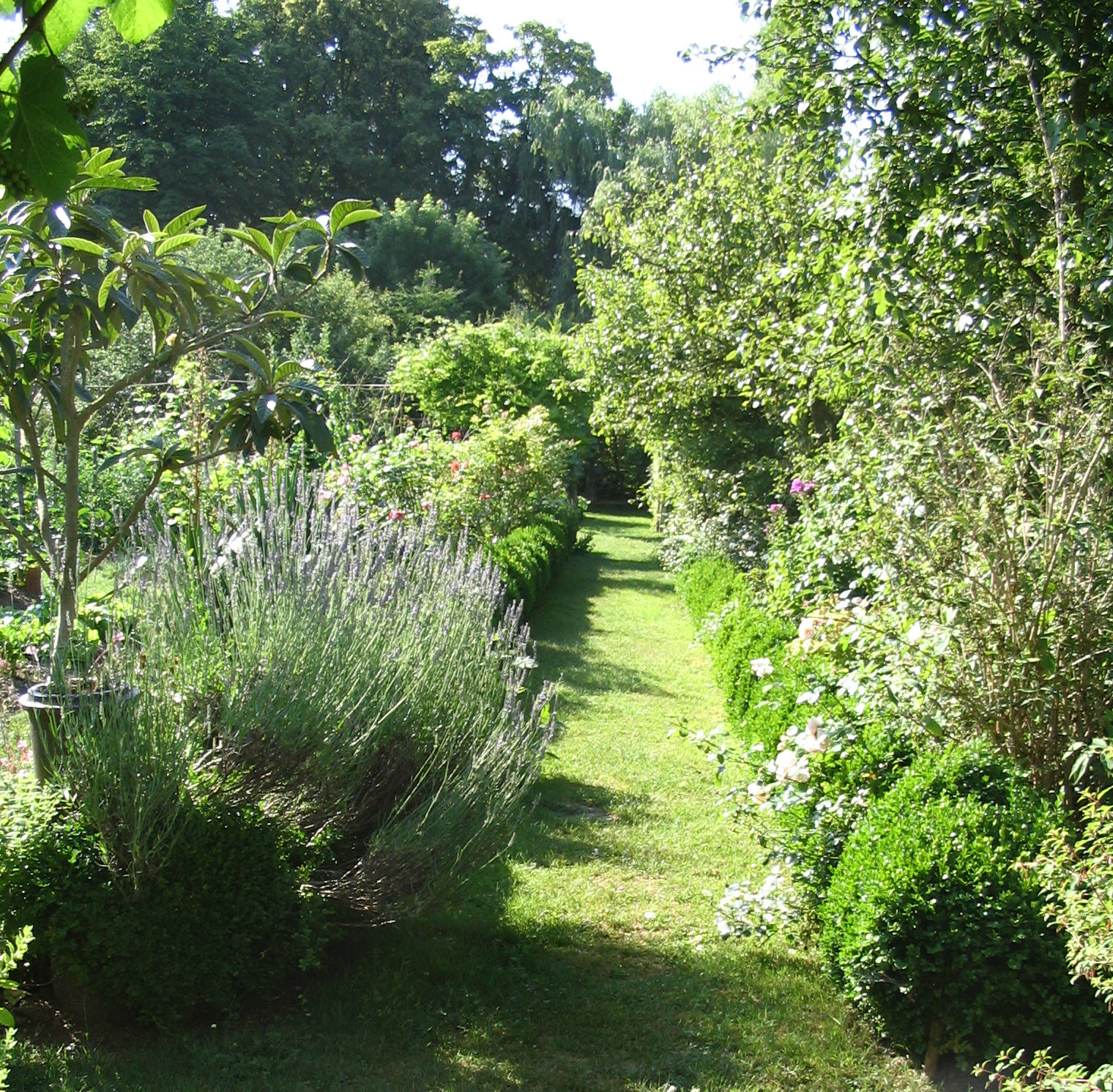 Jardin du presbytère de La Ferté-Loupière, dans l'Yonne